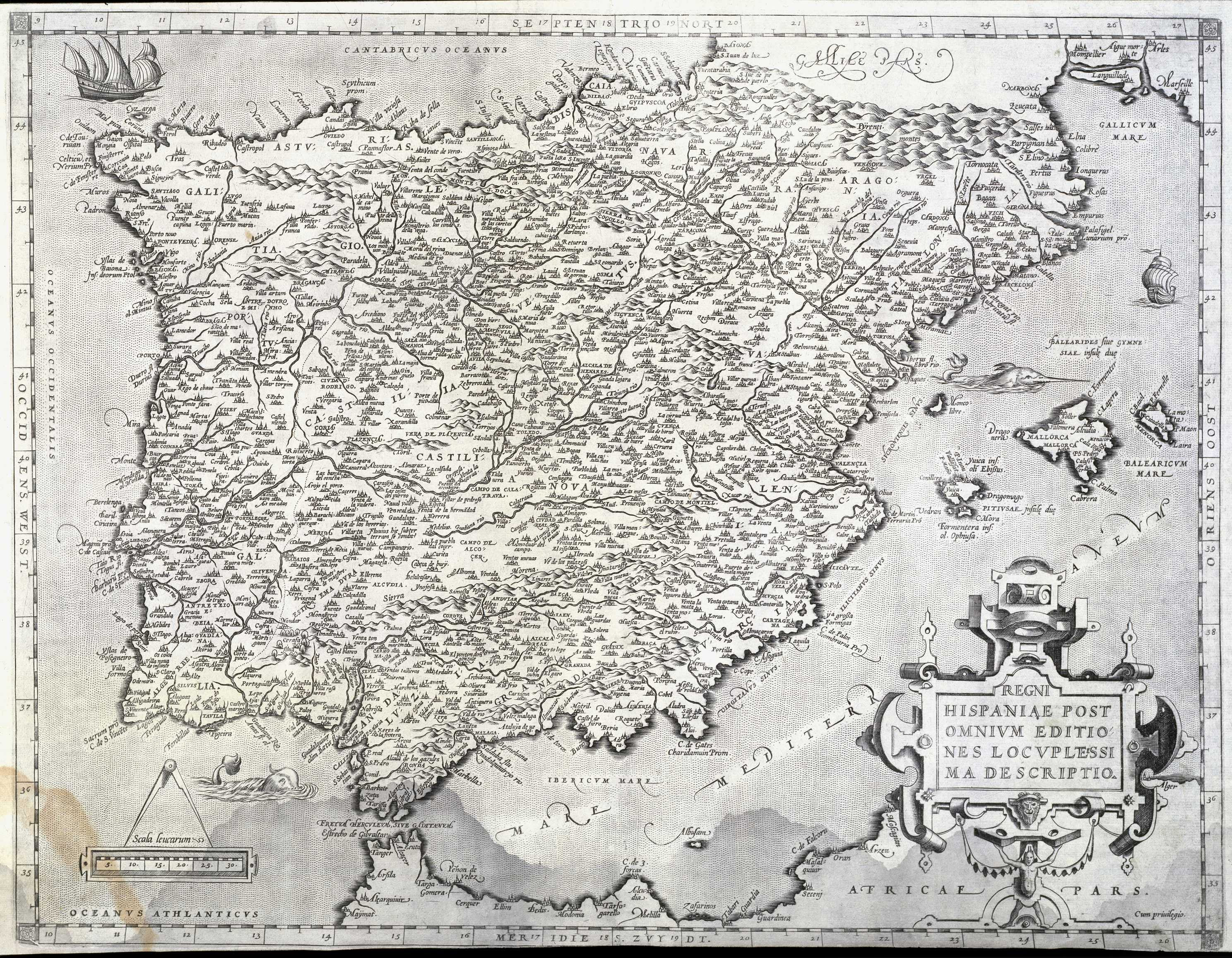 Mapa de la Península Ibérica: 39 x 50 cm Misma plancha del "Theatrum Orbis Terrarum" de Abraham Ortelius. - Antuerpiae, 1572, p. 13, edición alemana.